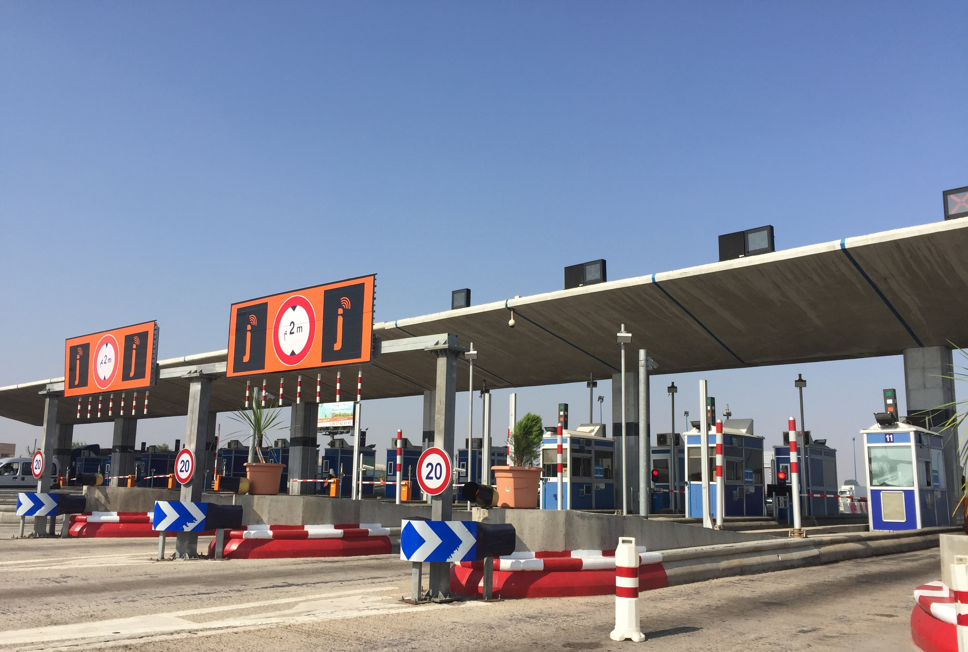 Péage de Kenitra (Autoroute marocaine A5)